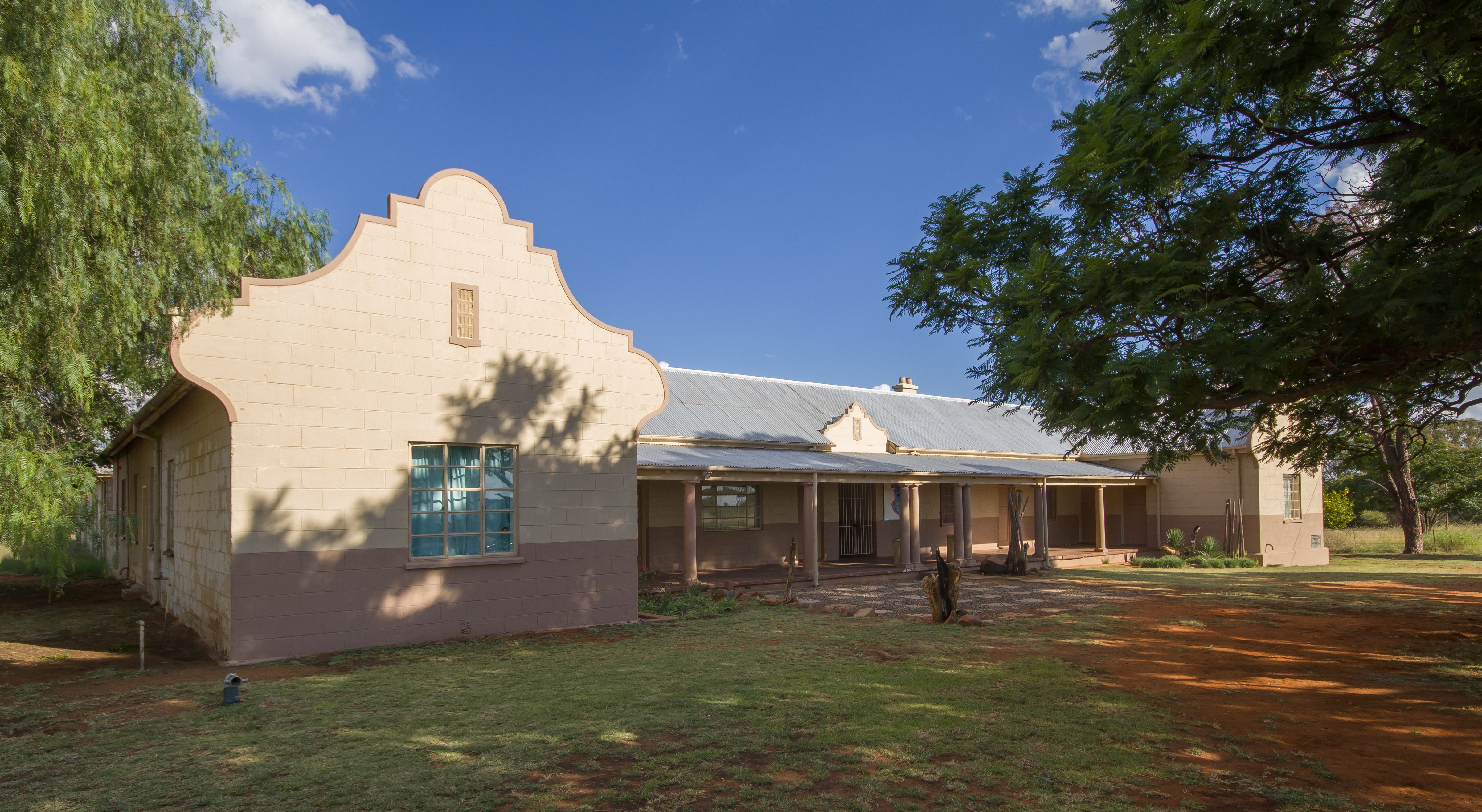 Die alte Kommandantur des ehemaligen Internierungslagers Andalusia im heutigen Jan Kempdorp